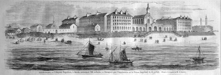 Dessin gravé figurant l'ancien et le nouveau hôpital de l'Assistance publique à Berck.